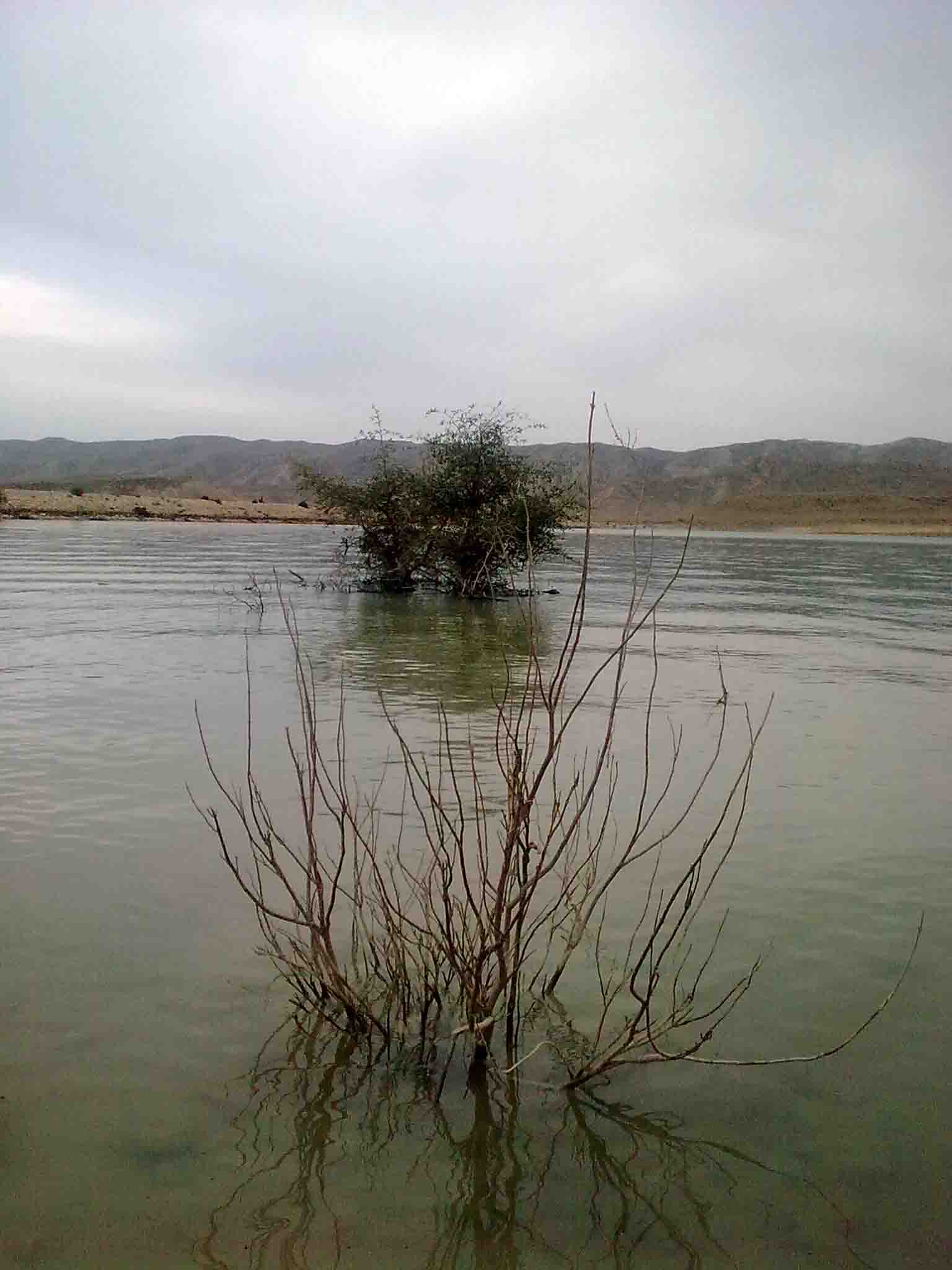 سد فرشته جان جویم